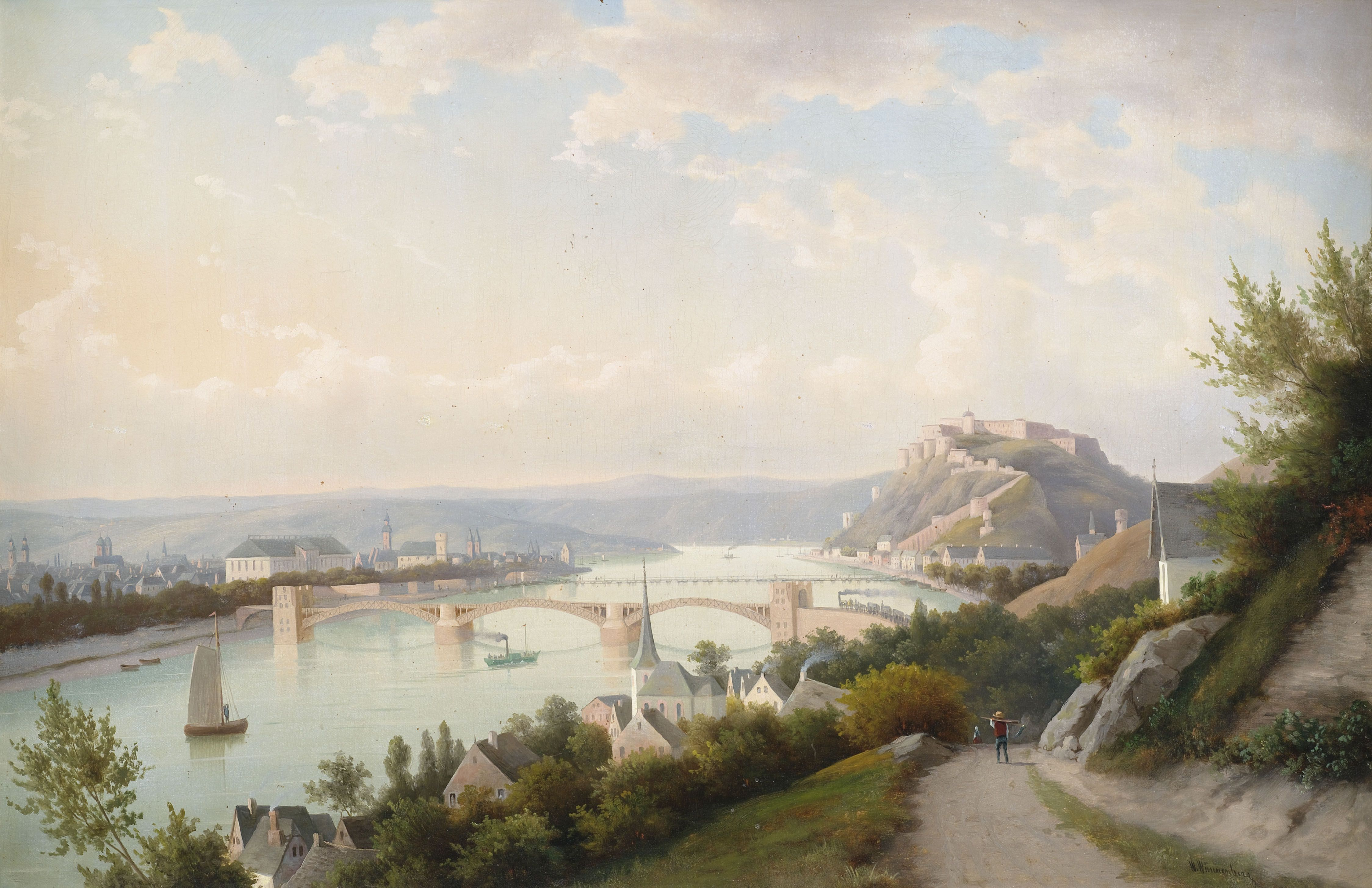 Rheinlandschaft bei Koblenz mit der Pfaffendorfer Brücke (erbaut 1864) und der Festung Ehrenbreitstein. Öl auf Leinwand, 55 x 81 cm, signiert.